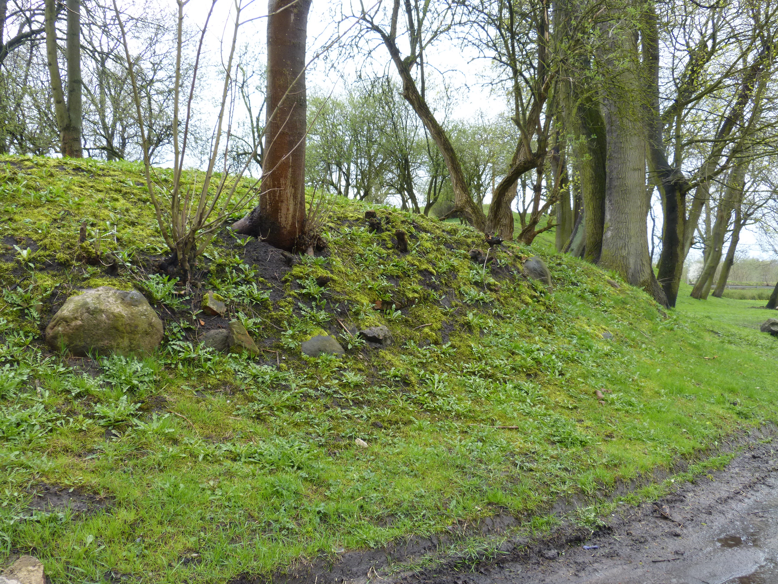 Zamek Białogard